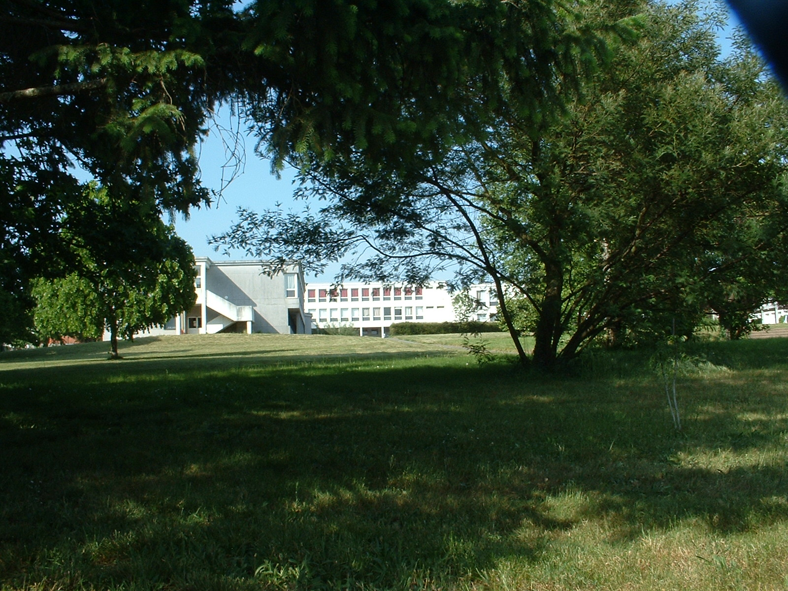 Nantes (France) - Lycée Albert-Camus - Parc